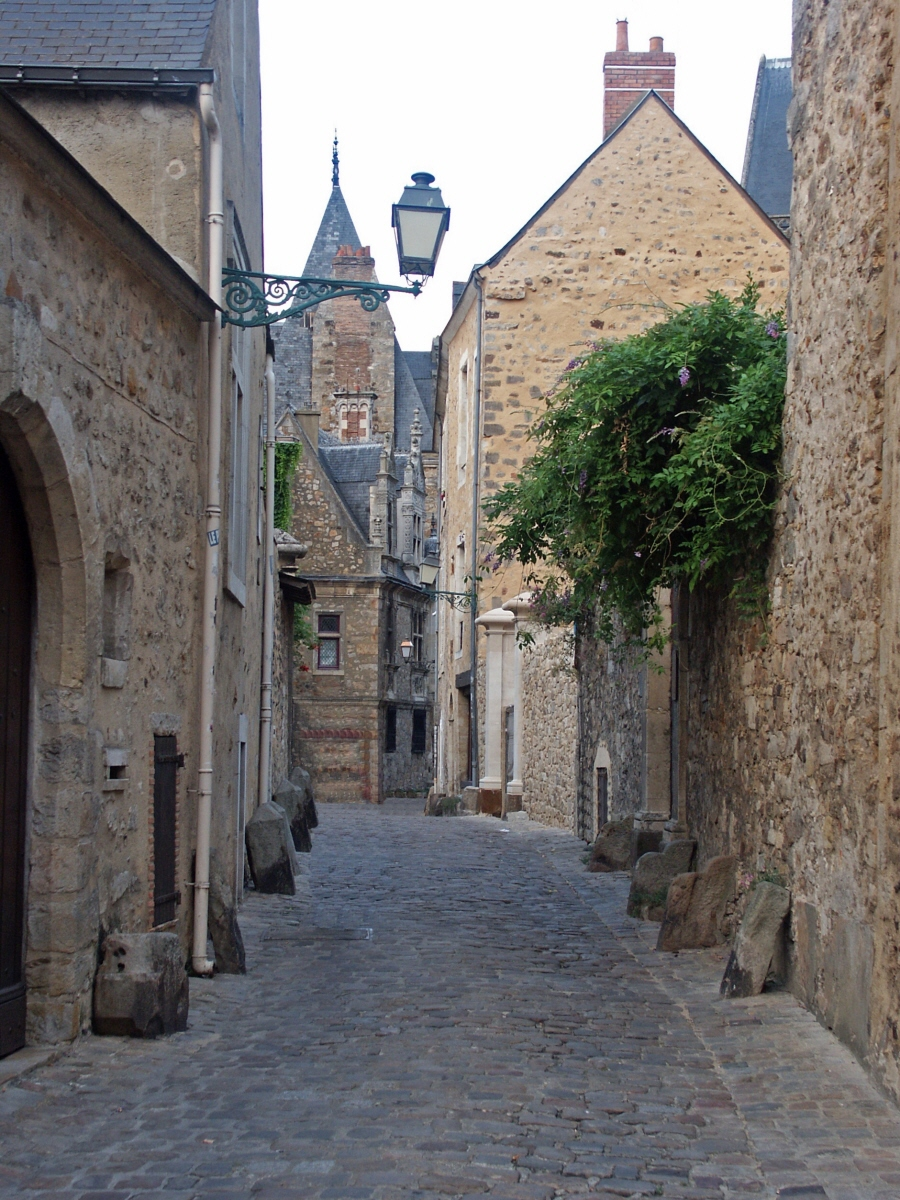 Le Mans (Sarthe, France); rue des Chanoines - Vieux Mans.